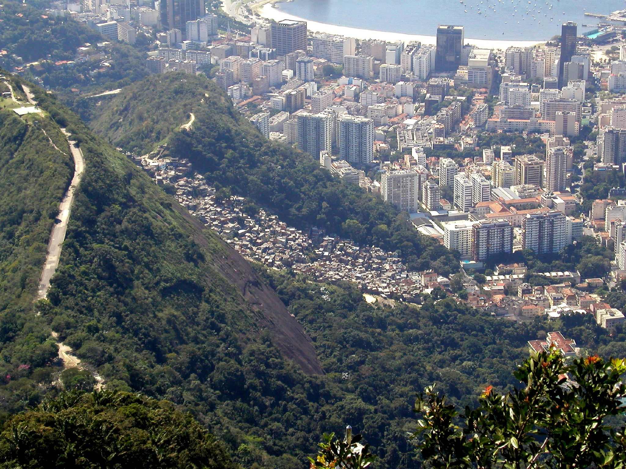 Favela Dona Marta as seen from Corcovado.